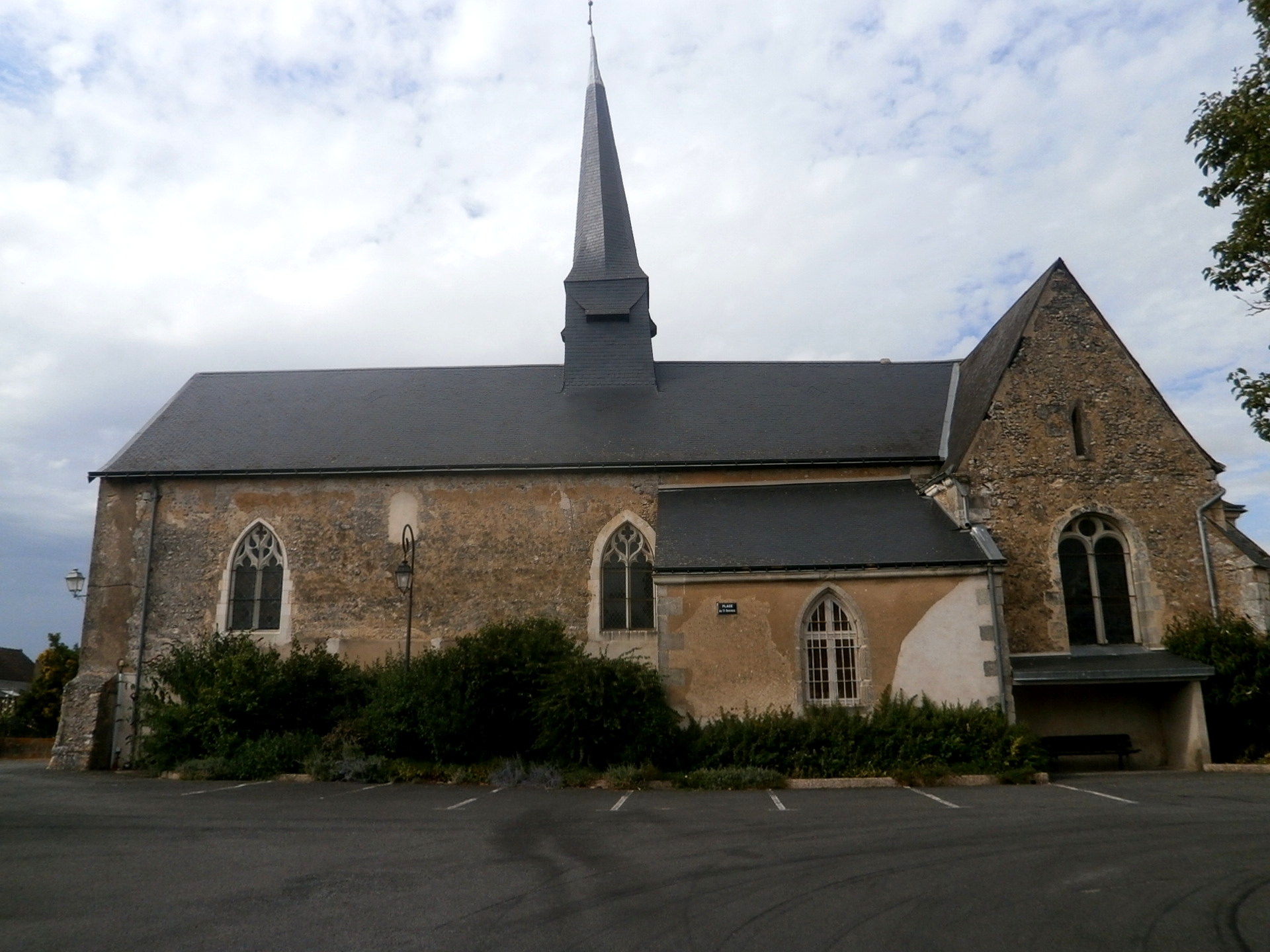 L'église